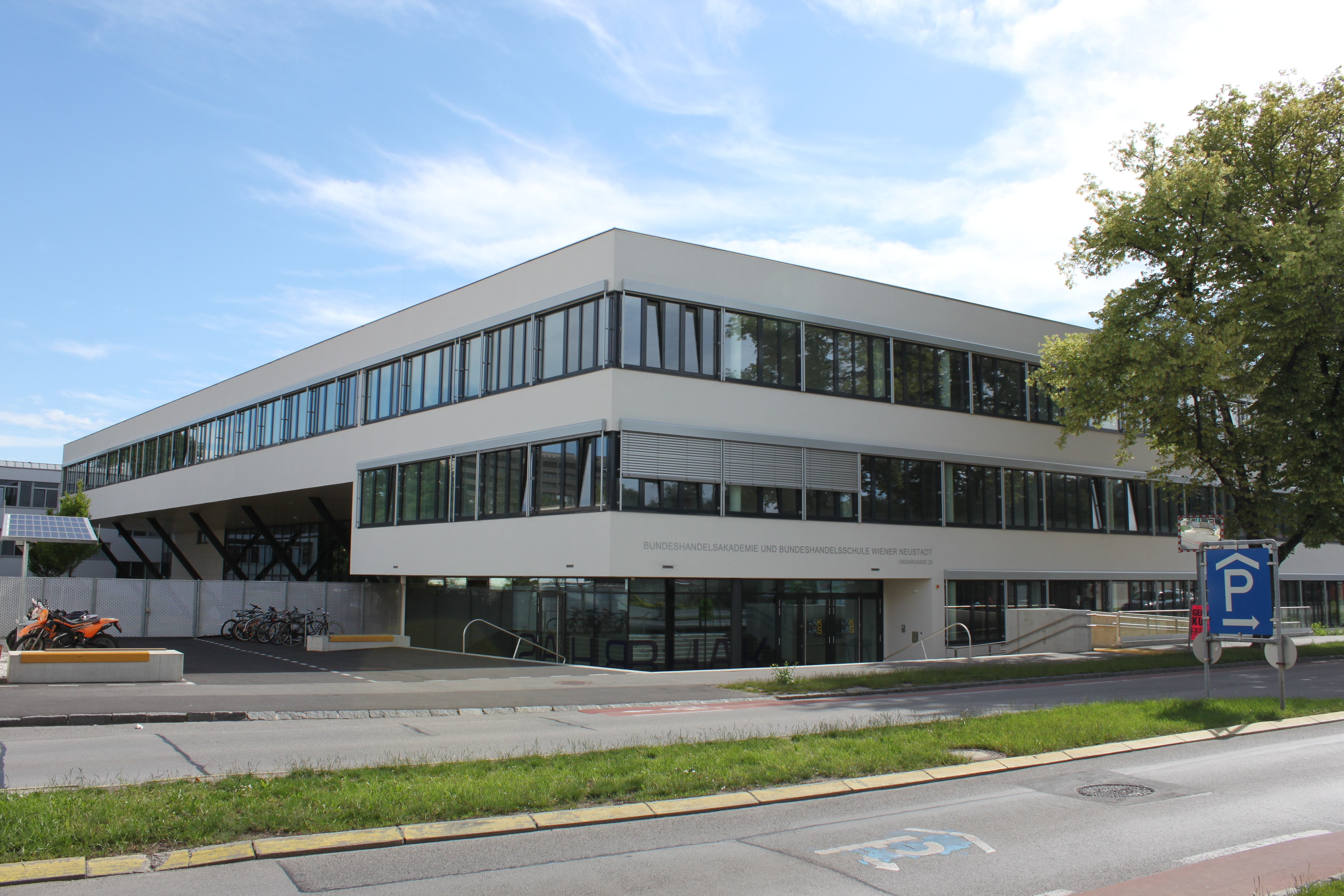 Handelsakademie und Handelsschule Wiener Neustadt in der Ungargasse